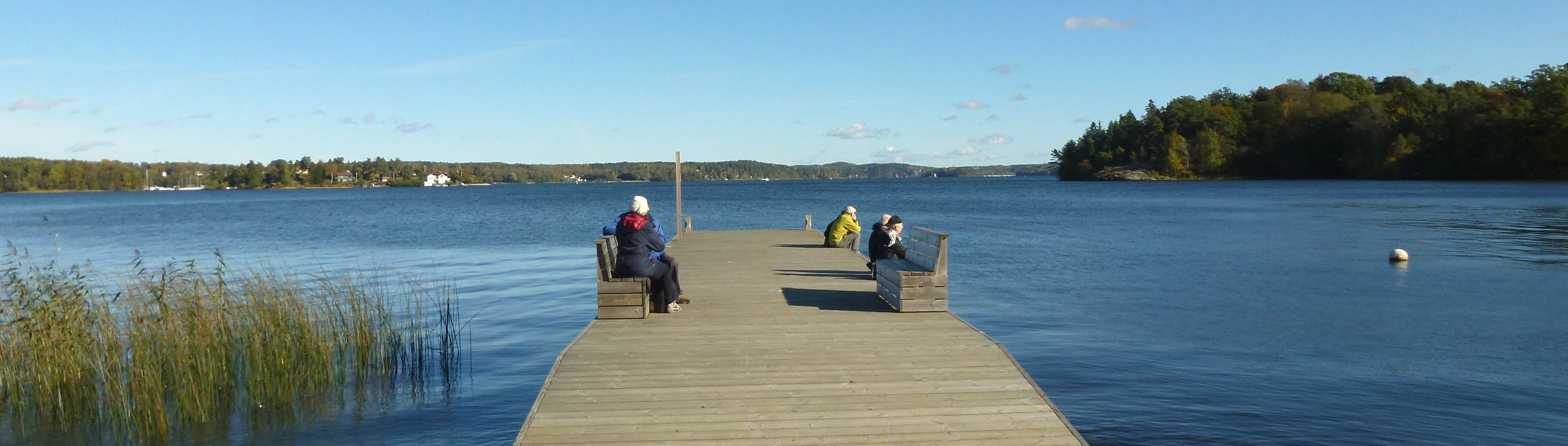 Kyrkfjärden från Sturehovs brygga